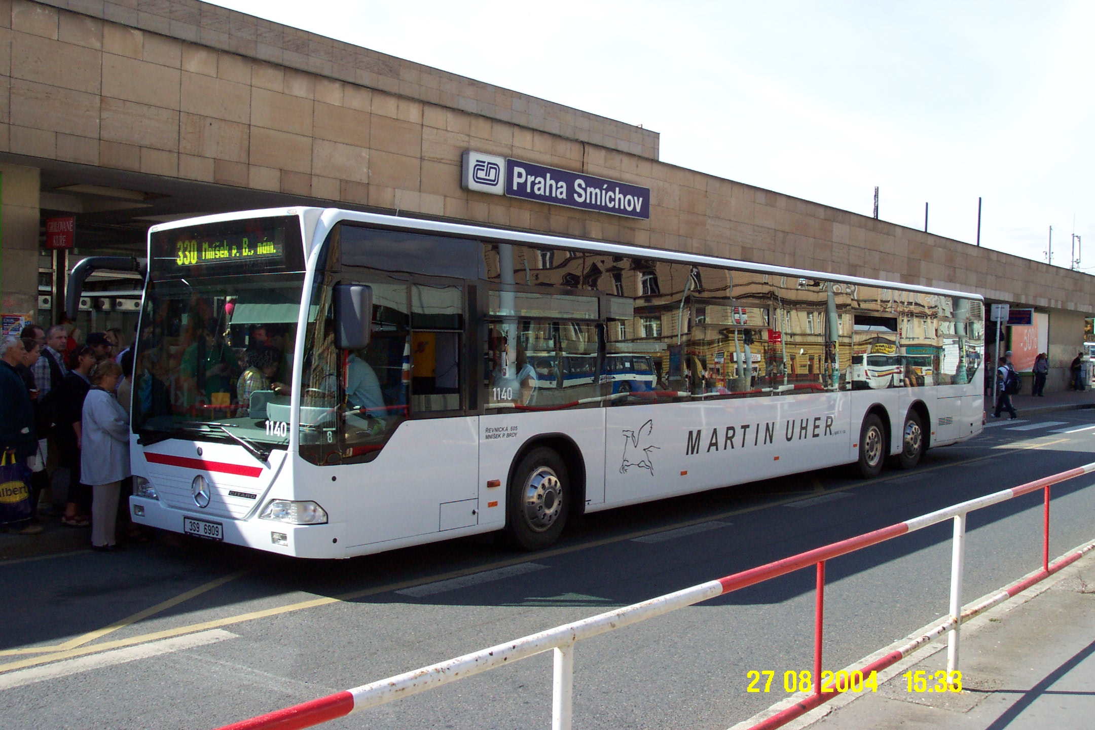 Pražský autobus Mercedes Citaro (a také některé další autobusy)nápověda